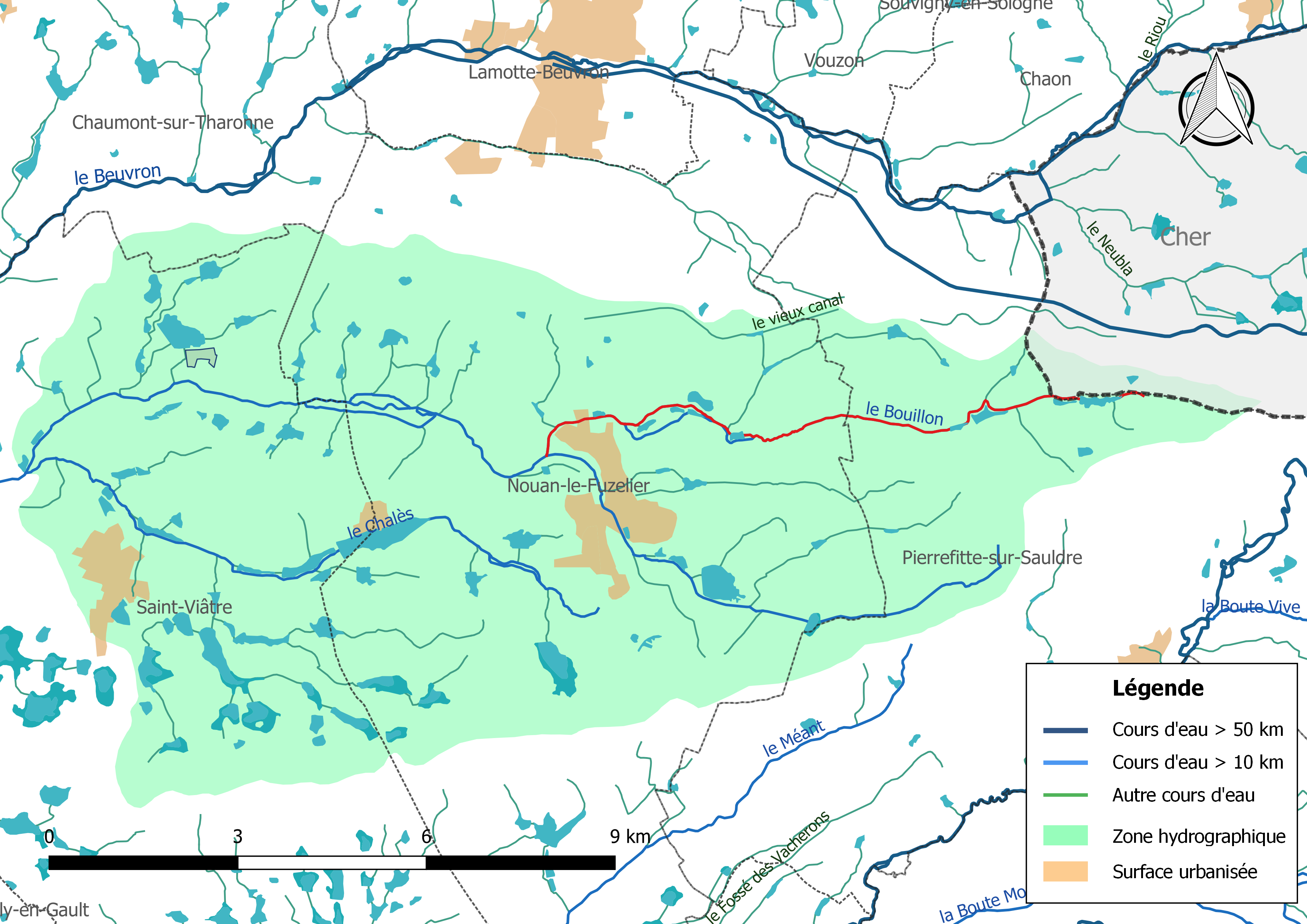 Carte du cours d'eau « le Bouillon » et de son bassin versant (zone hydrographique dans laquelle il s'insère).